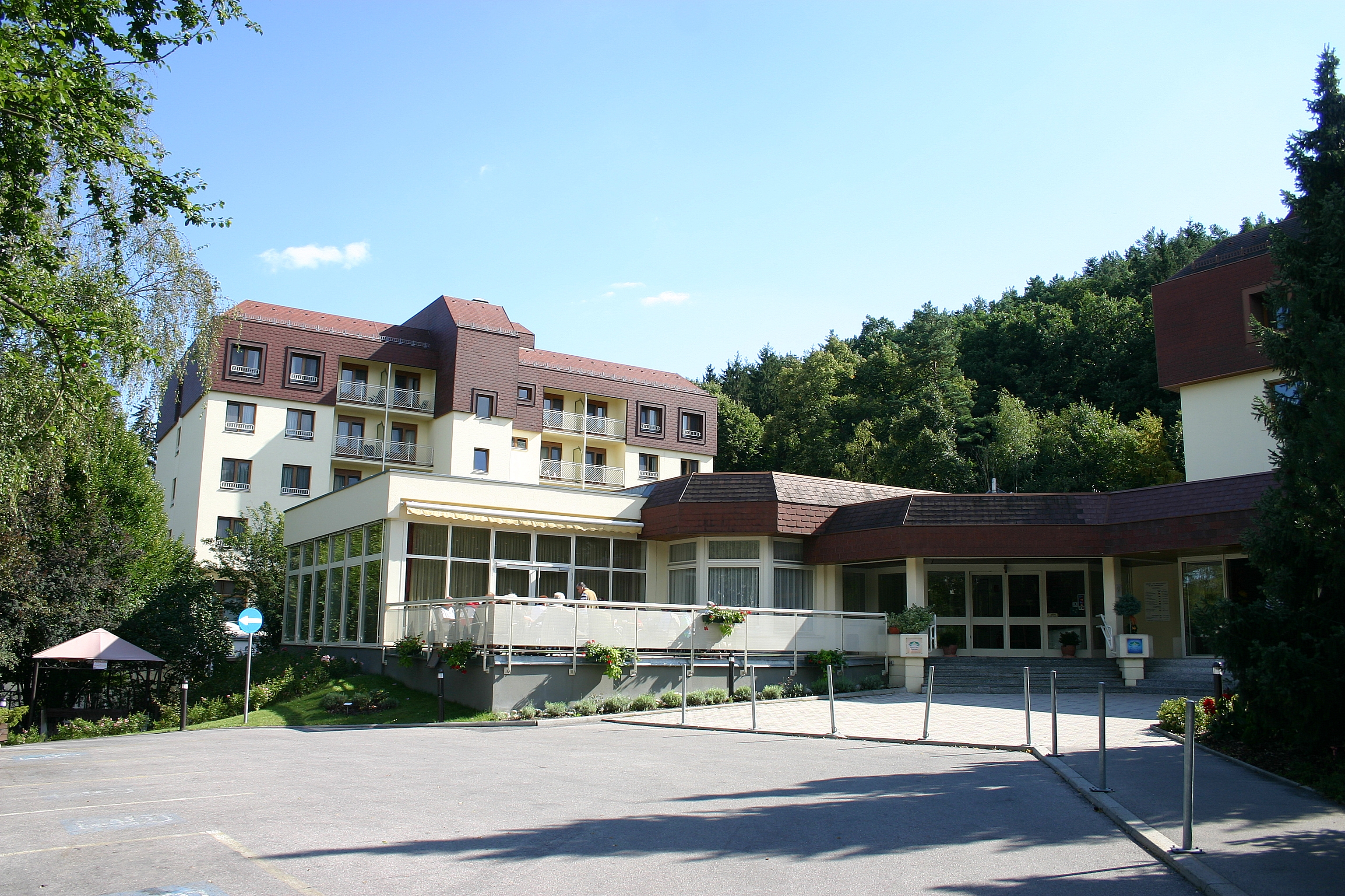 Bad Sauerbrunn Kuranstalt Haus Grimm